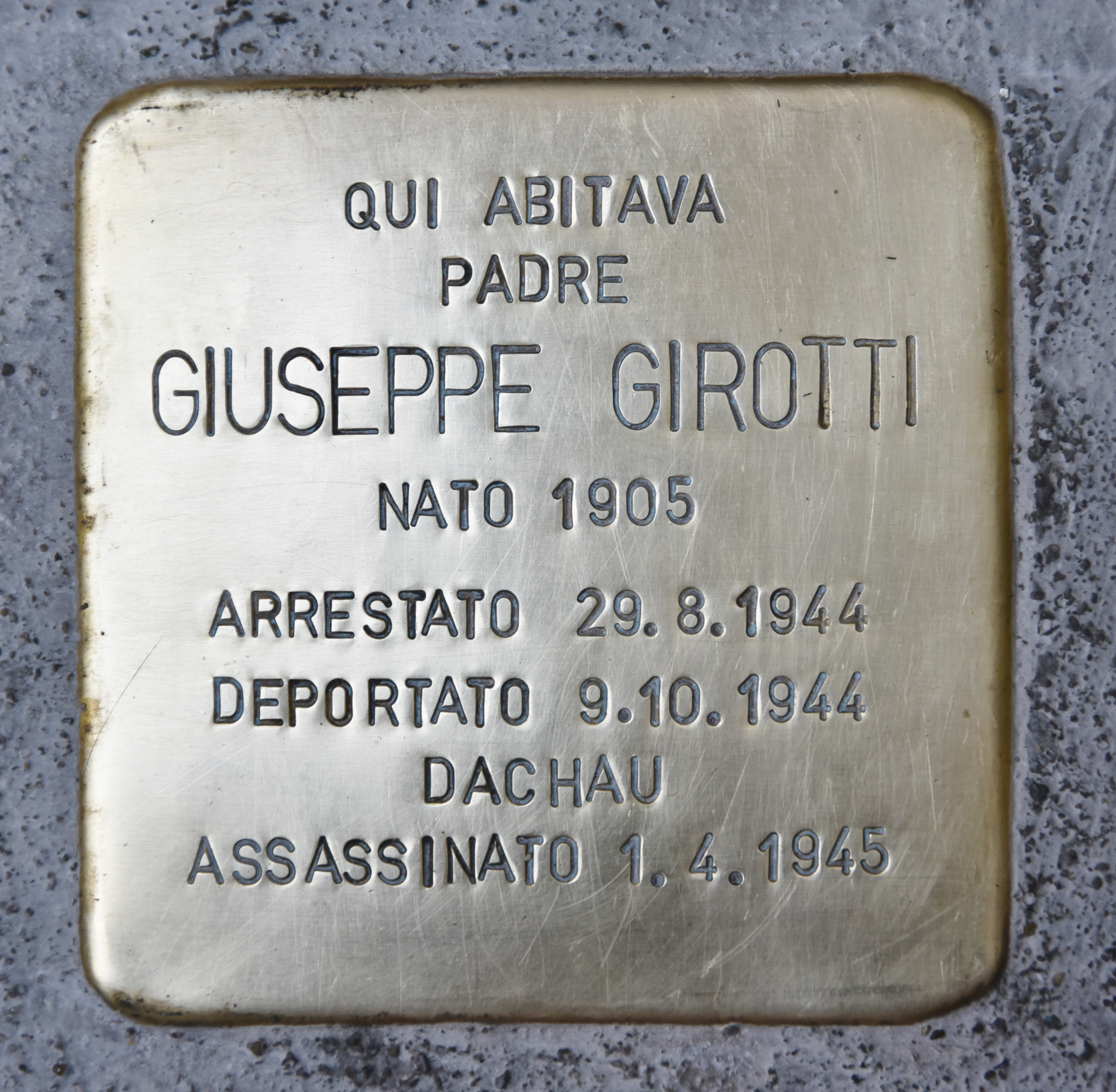 Stolperstein für Giuseppe Girotti